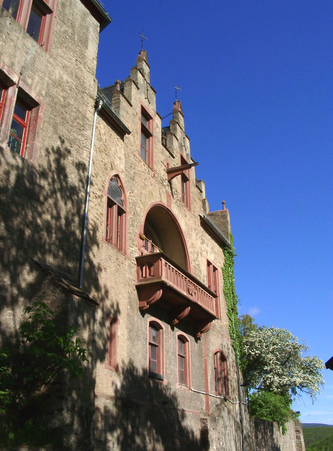 Schloss Kransberg Fassade